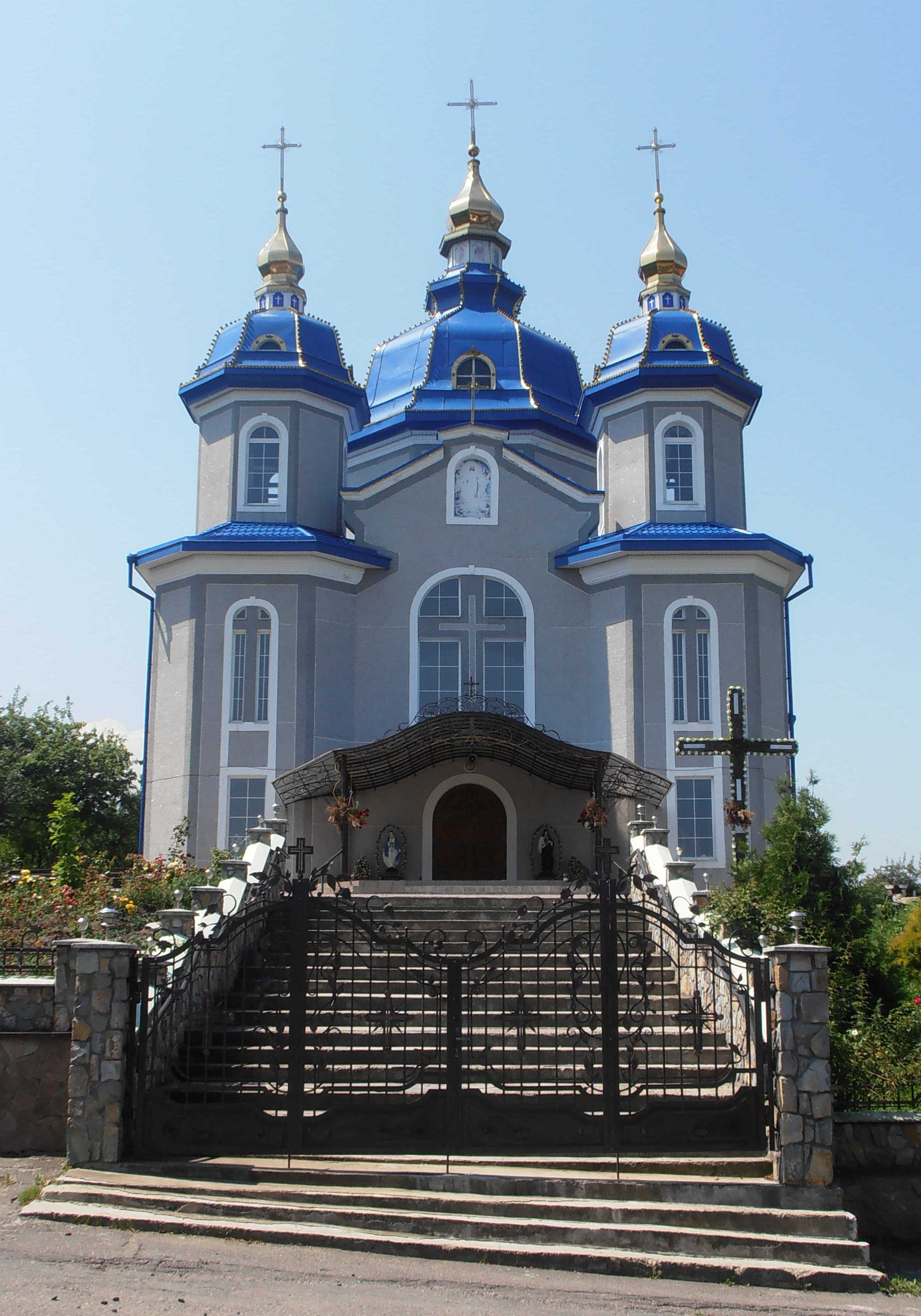 Нова церква